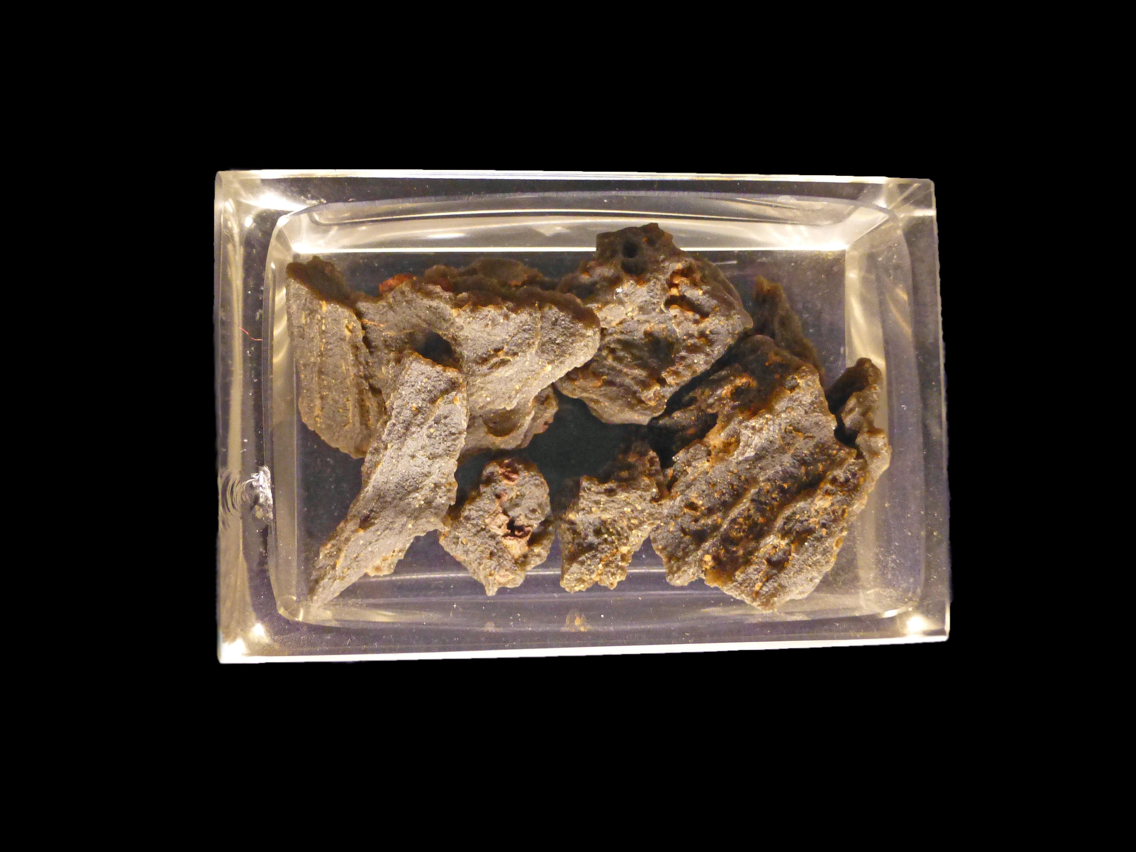 Guelb Aouelloul (Adrar, Mauritanie). Impactites récoltées près d'un cratère d'impact vieux de 3 millions d'années. 9 éch. Musée de minéralogie de Strasbourg